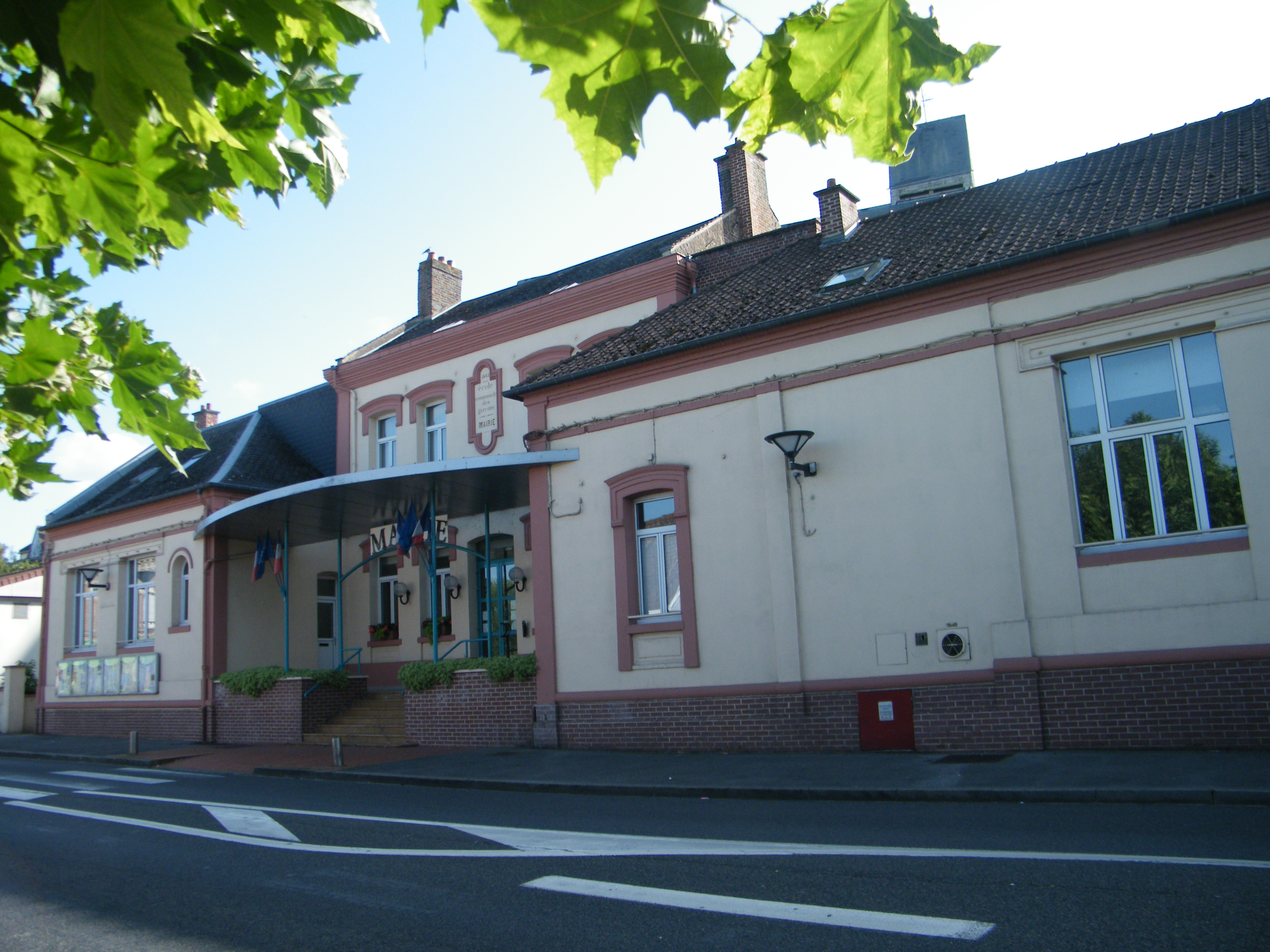 Ailly-sur-Somme, Fr mairie-école